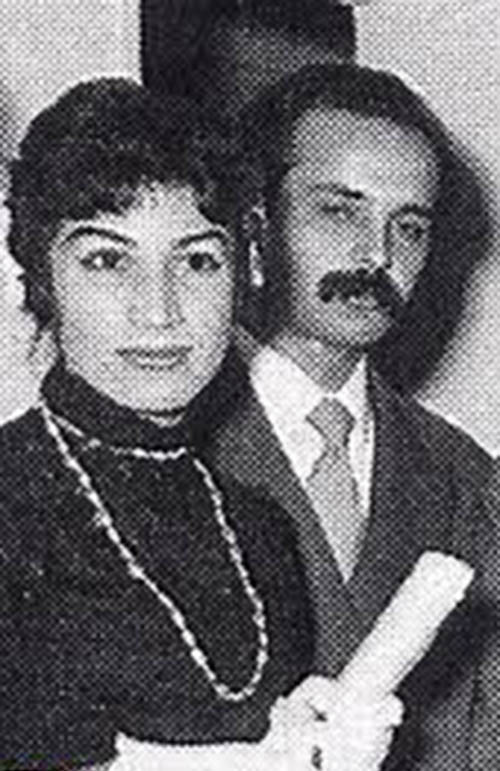 هوشنگ ابتهاج و فروغ فرخزاد - اوایل دهه 1340 خورشیدی